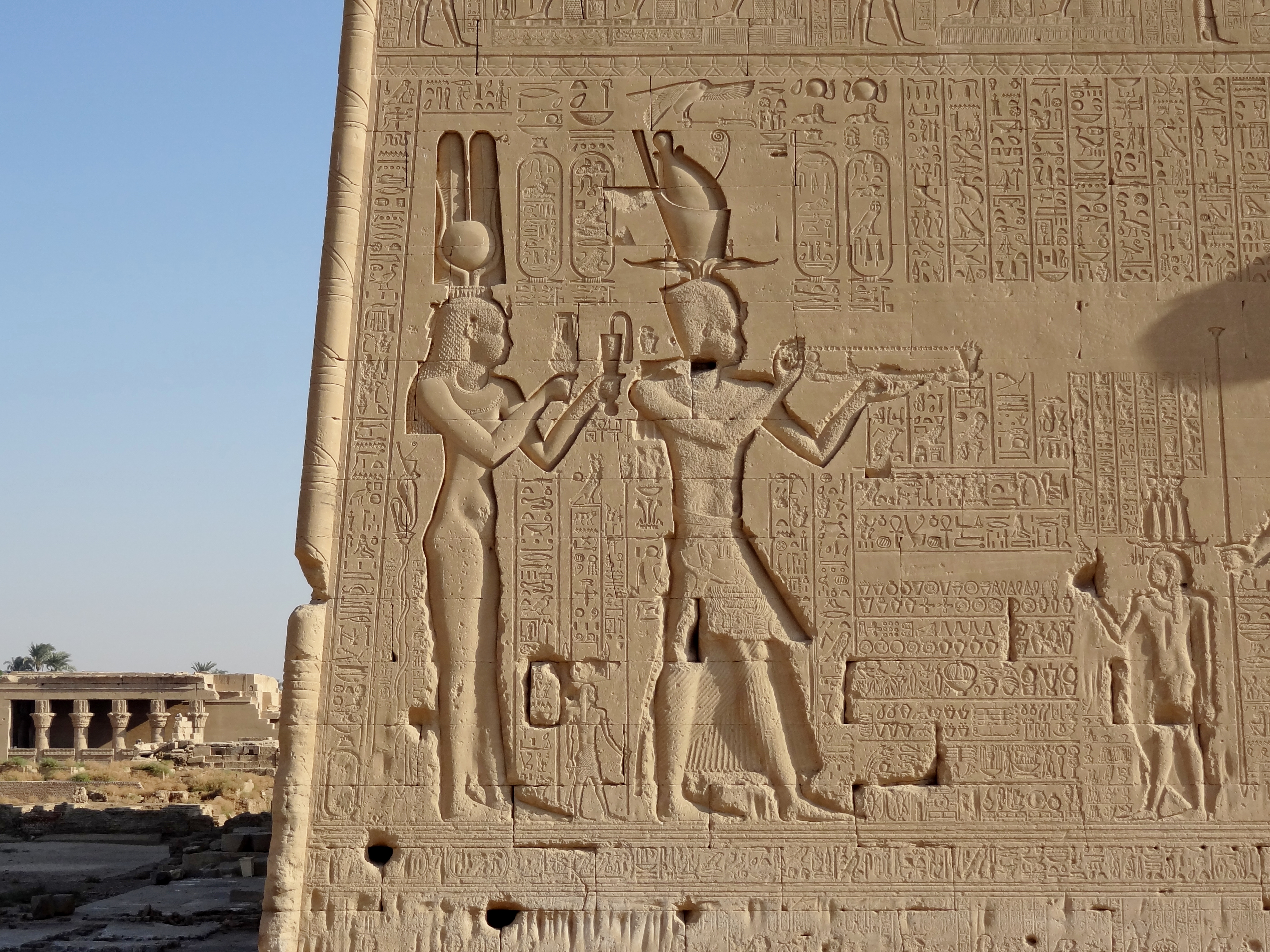 Relief mit Kleopatra VII. und ihrem Sohn Cäsarion an der Südseite des Hathor-Tempels von Dendera, Ägypten